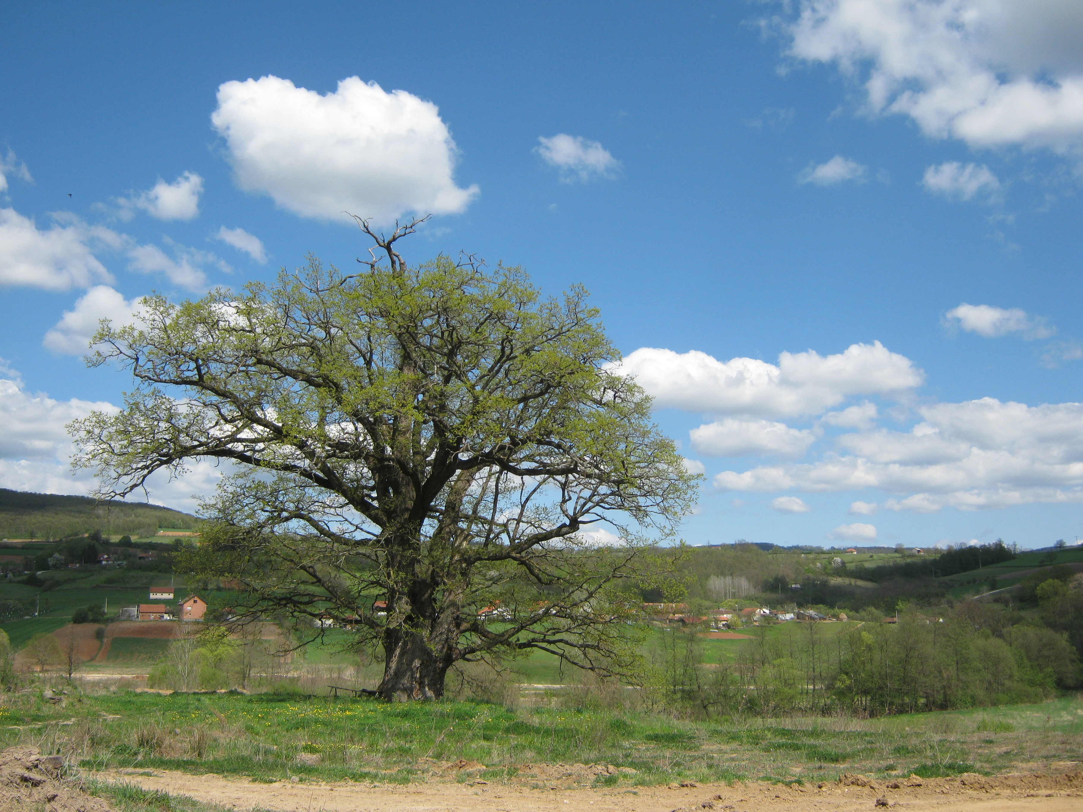 Запис чија је старост процењена на 600 година, у месту Росуље, село Шарани.